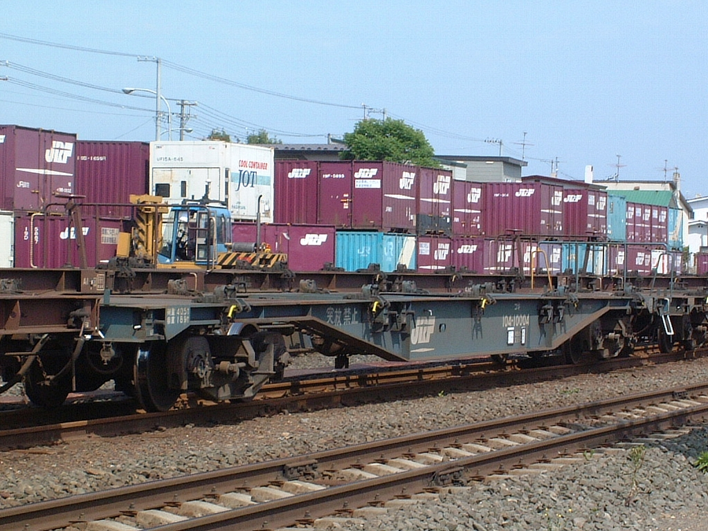 JR貨物コキ104形コンテナ車（コキ104-10004） JR北海道根室本線新富士駅で撮影